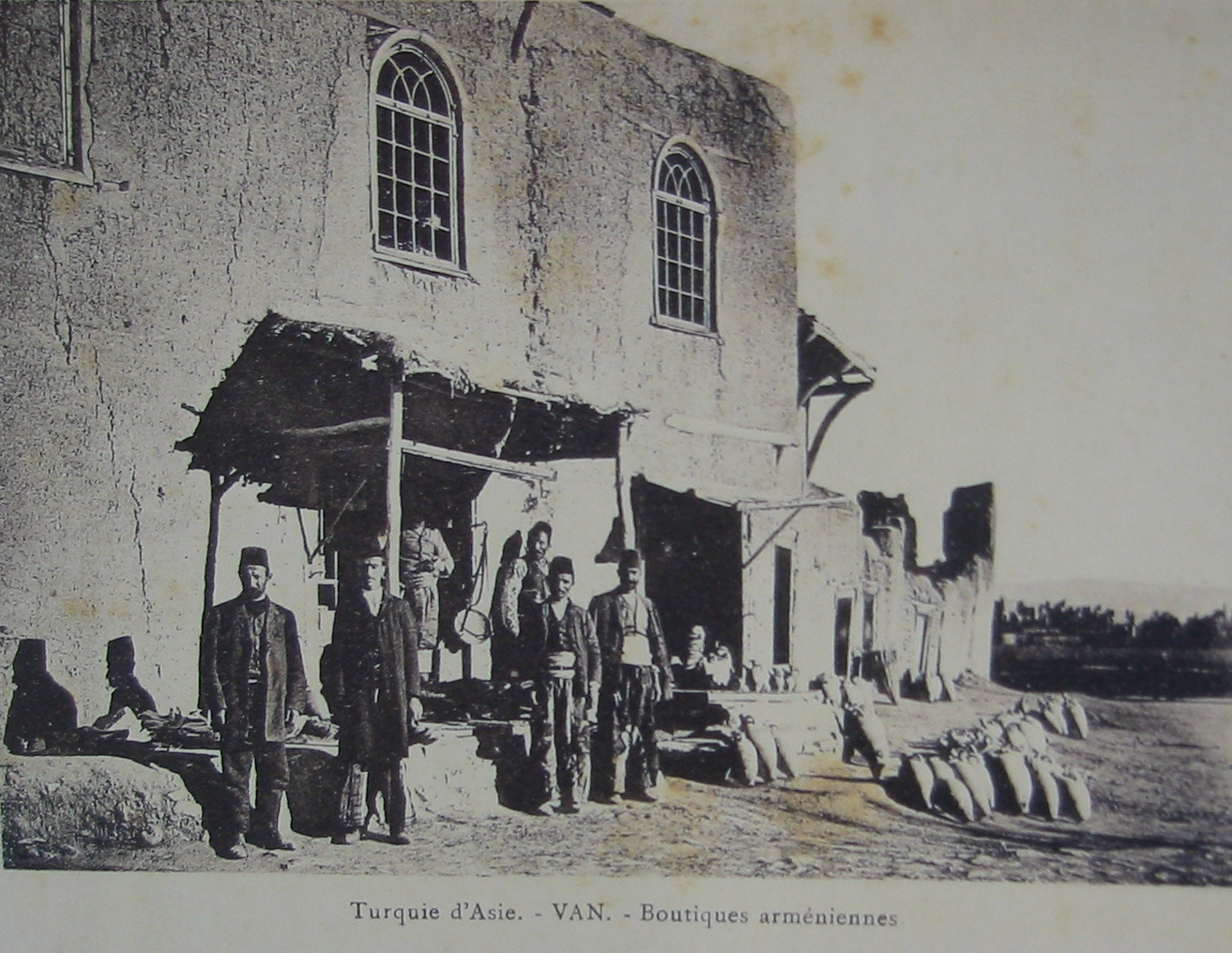 Comercio de armenios en la ciudad de Van (Turquía)